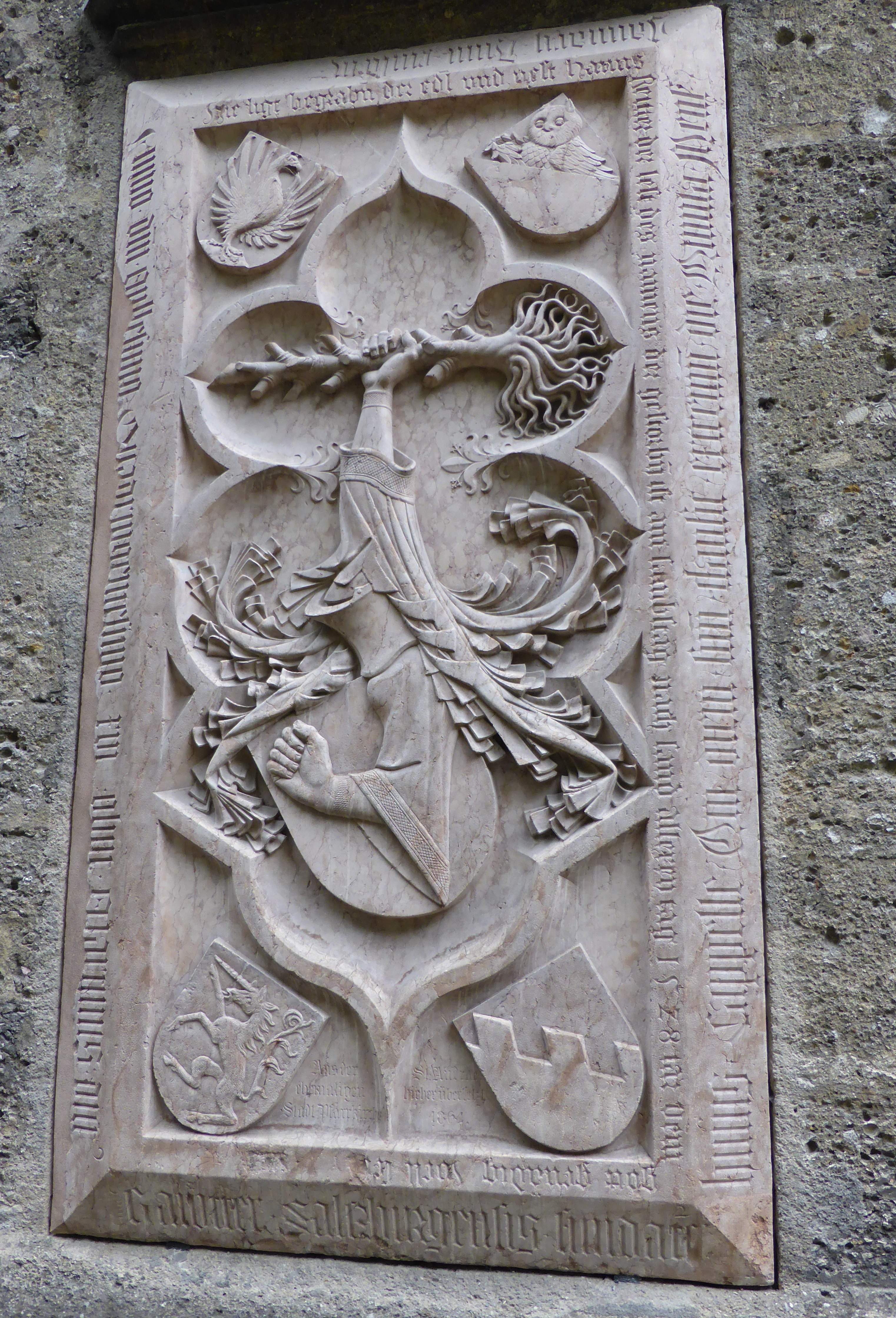 Stadtrichter Martin Reuter - Onkel Hans Reuter, Stifter von St. Andrä, seit 1864 außen an der südlichen Wand der Margarethenkapelle angebracht, im Petersfriedhof Salzburg